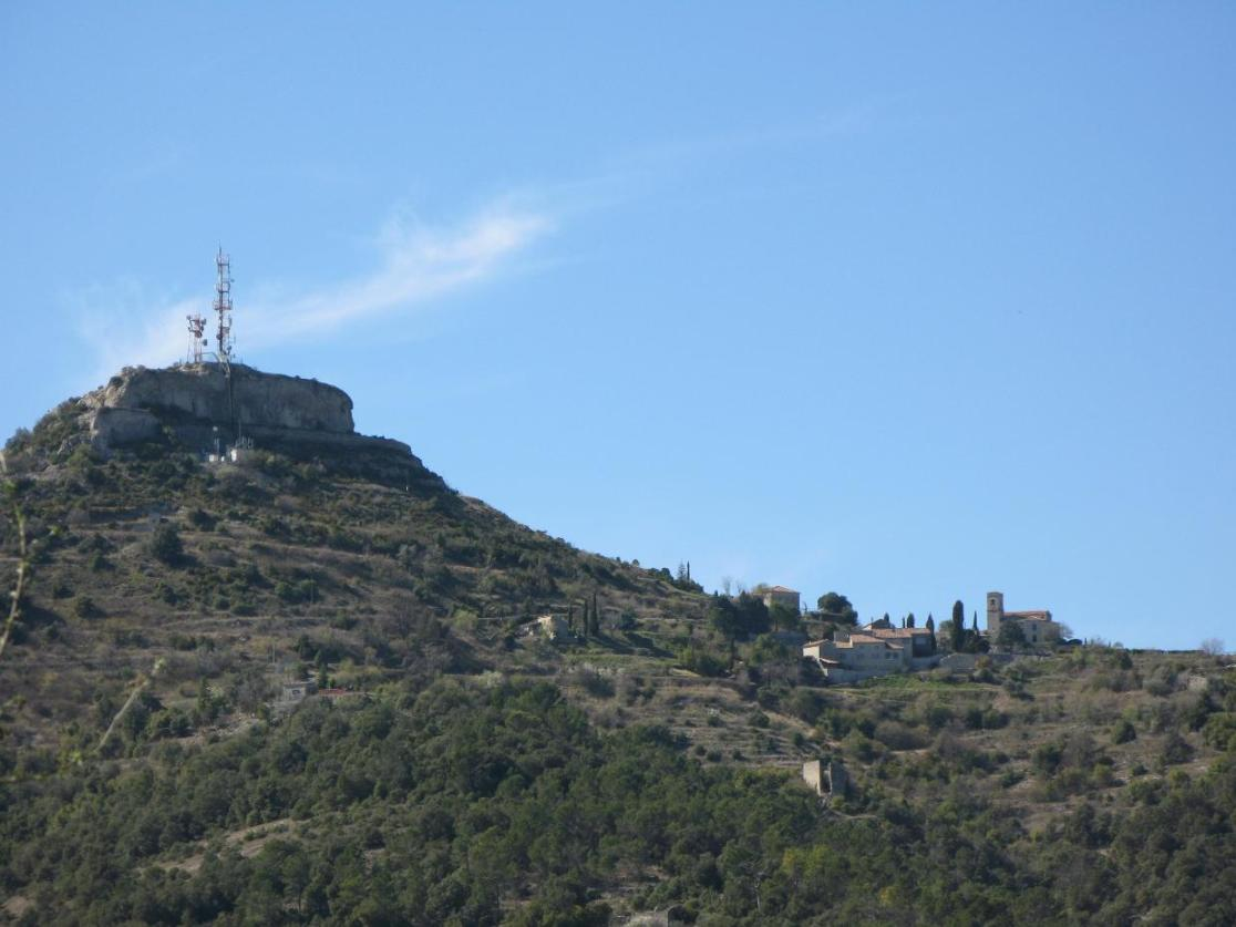 Village de sampzon (Ardèche)